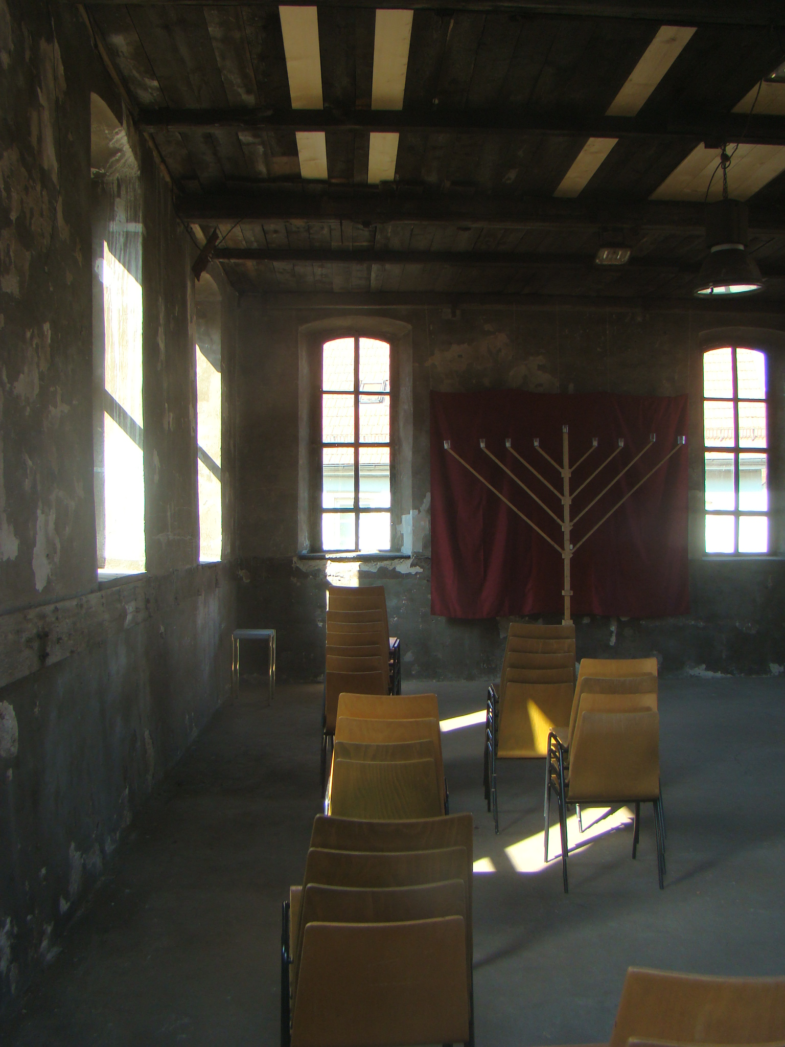 Synagoge in Heinsheim